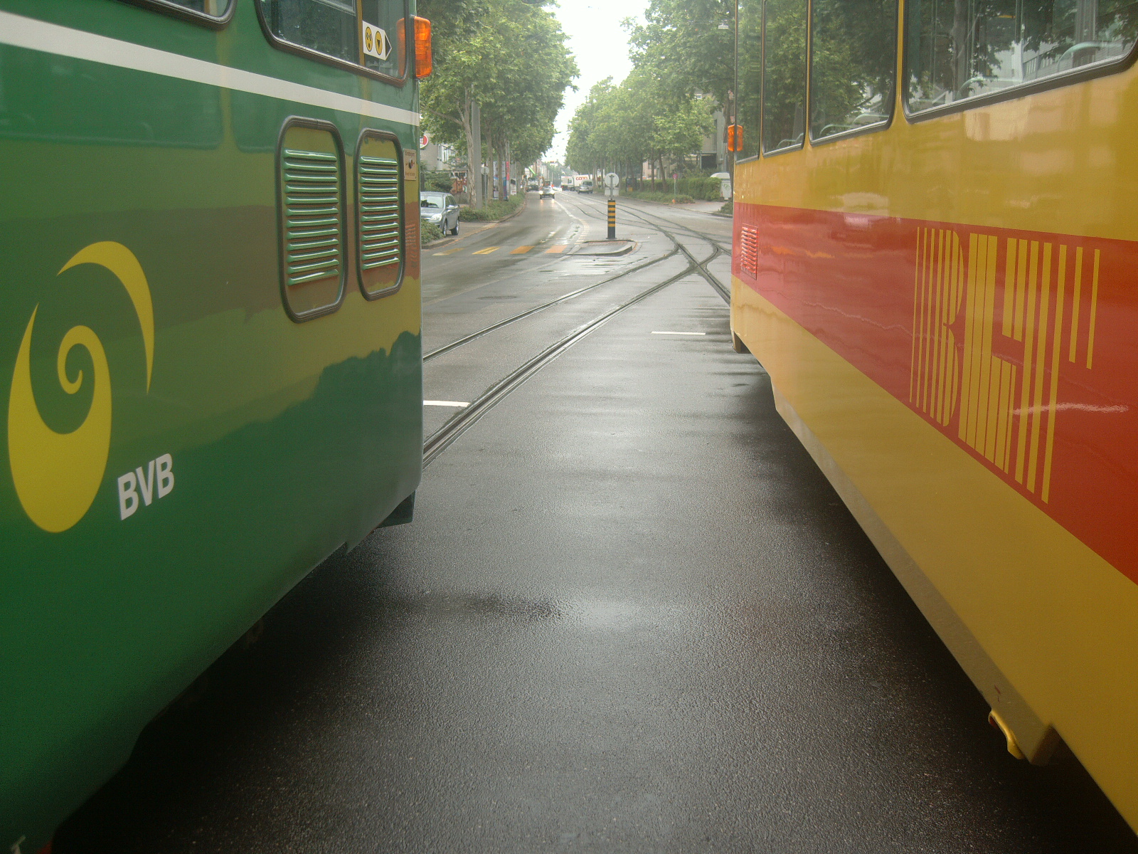 Un tram vert des BVB (à gauche) et un tram jaune de BLT (à droite) à Bâle